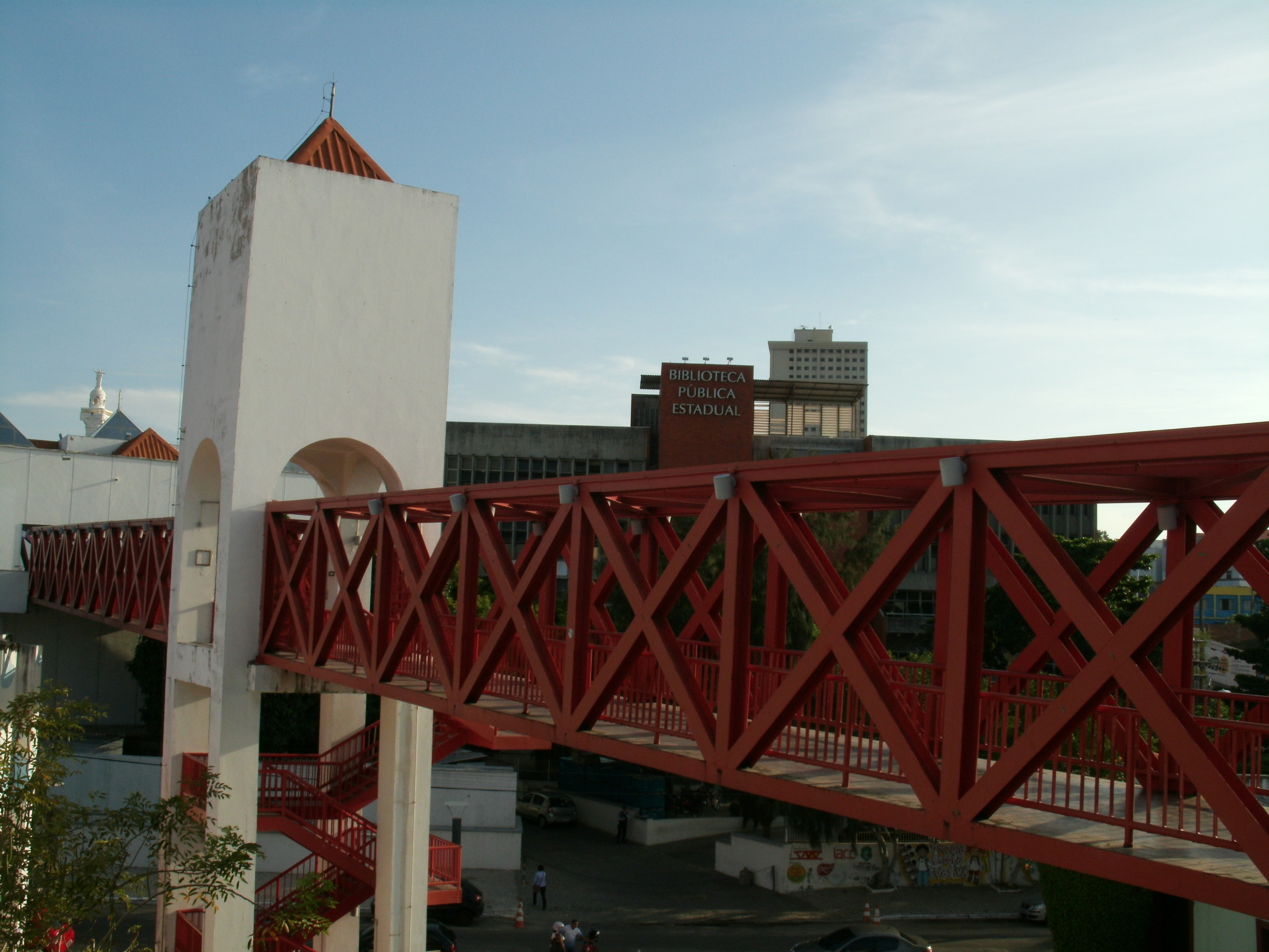 Retrato do Centro Cultural Dragão do Mar, em Fortaleza (CE)